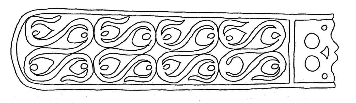 Szíjvég rajza Tiszafüred-Majorosról